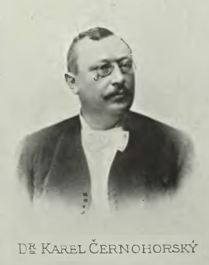 Portrét – Karel Černohorský (1861-1915), Český advokát a politik.